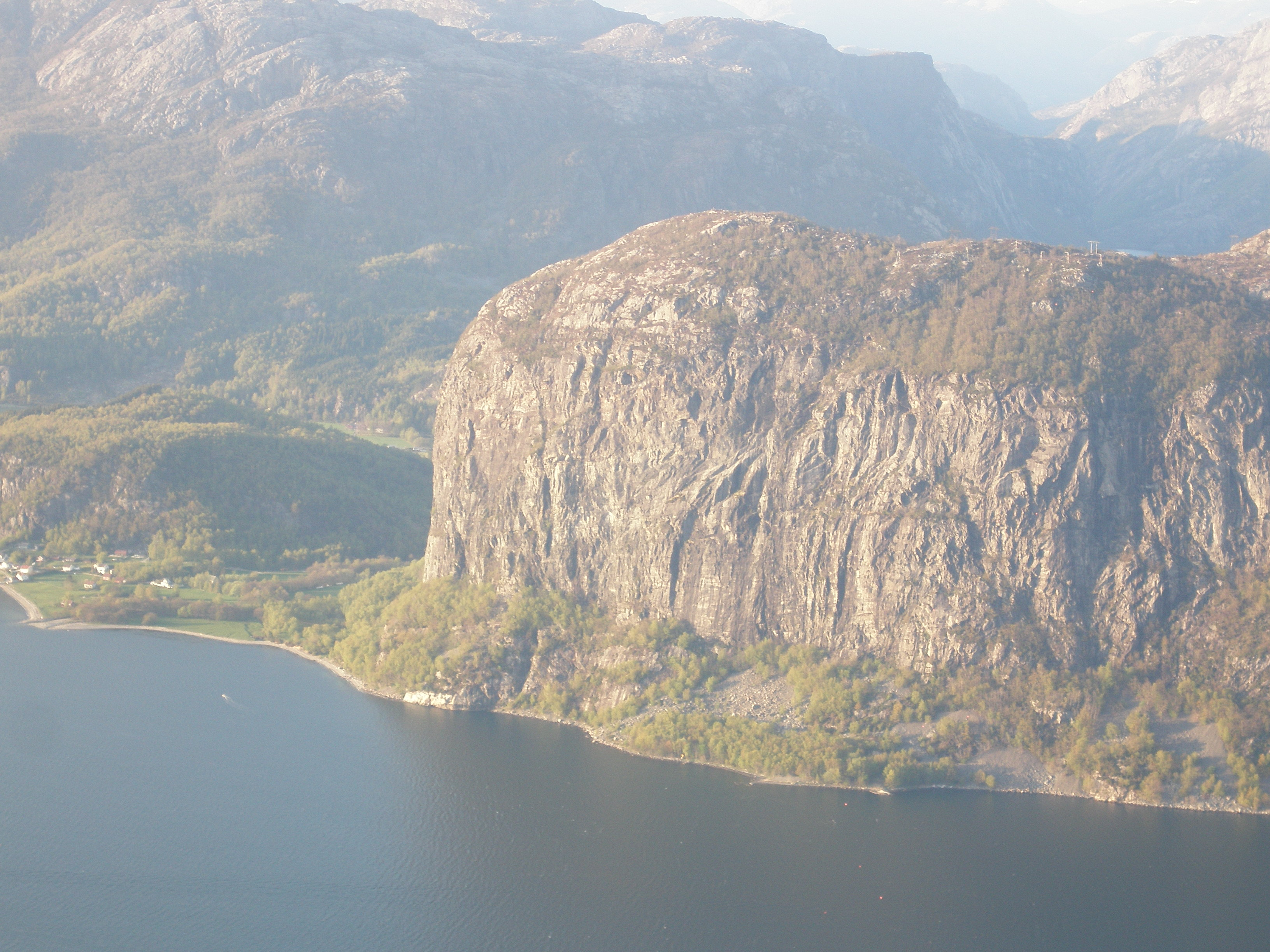 Uburen ( 440 m.o.h.) sett fra Selvikstakken. Til venstre for Uburen sees utløpet til Forsandåna i Høgsfjorden, samt husene i Forsandhagen.